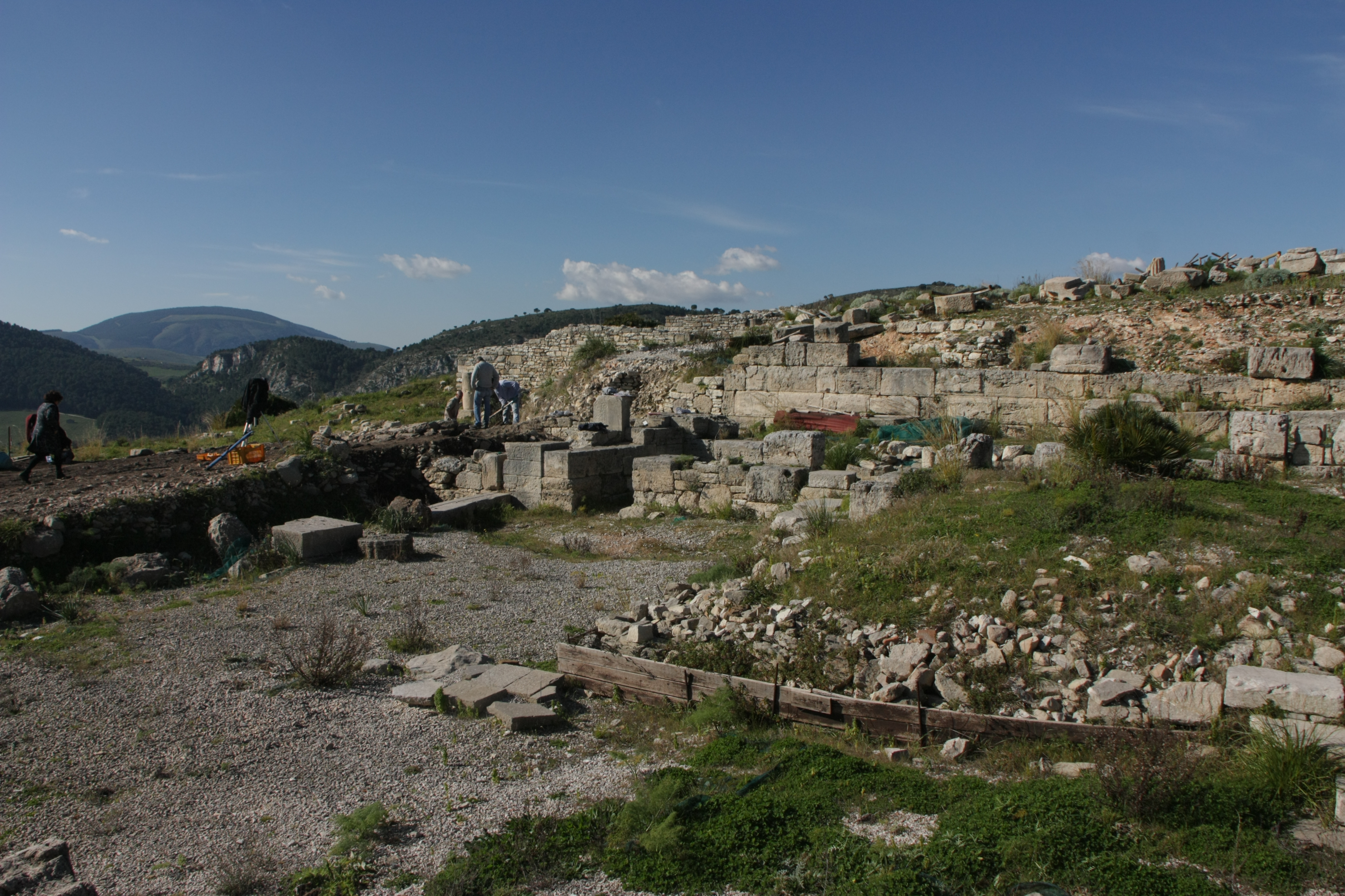 Agora di Segesta